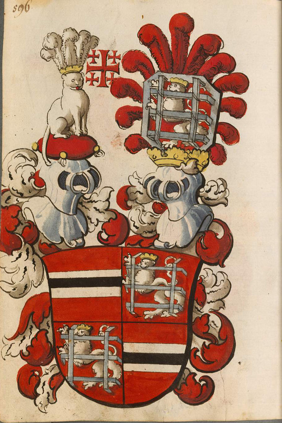 Scheibler'sches Wappenbuch, neuer Teil Wappen der Familie Laiming (Wappenbesserung verliehen von Kaiser Sigismund am 8. Mai 1434 zu Basel dem Erasmus von Laiming). Bayern Seite 596